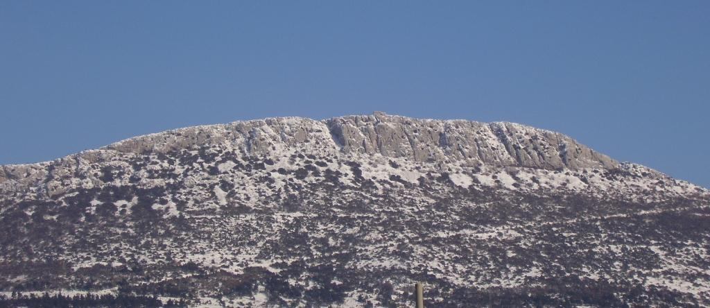 Vrh brda Kozjak: pogled iz Kašteli